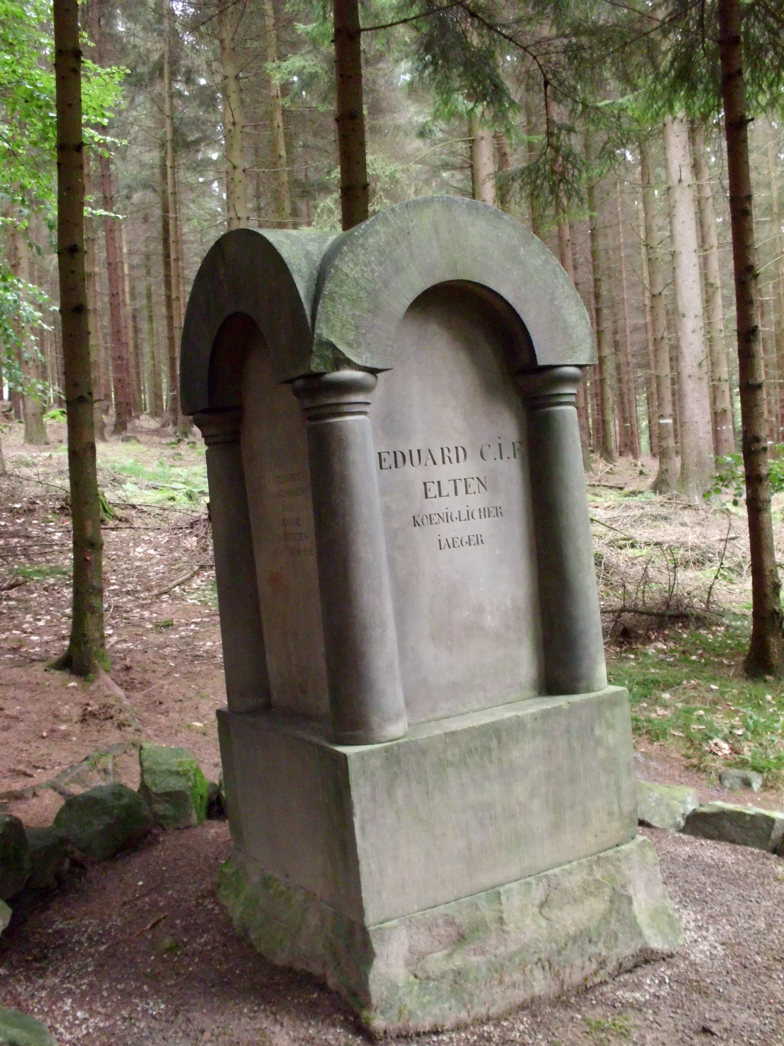 Gedenkstein für den königlichen Jäger E. Elten im Deister (Eltenweg).